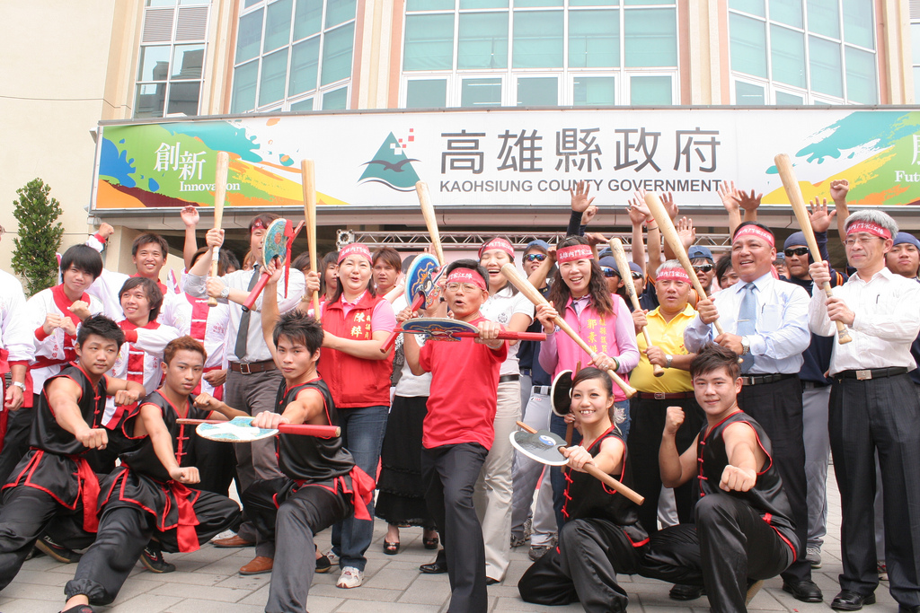 2010年4月6日，高雄縣政府舉辦高雄縣內門鄉「2010高雄內門宋江陣嘉年華會」宣傳記者會。